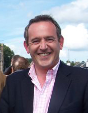 Stewart Hosie, député du parti politique écossais SNP. Stewart Hosie, MP (SNP)